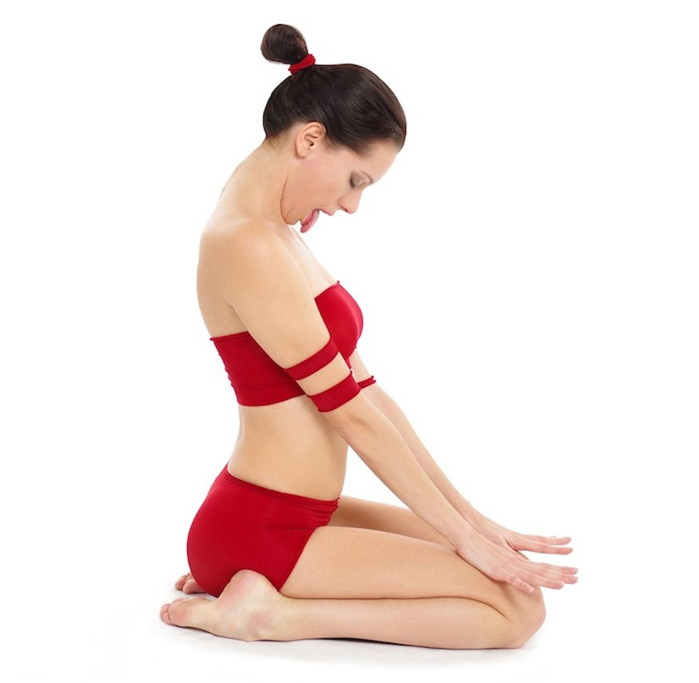 Simhasana by Nina Mel, Yoga Teacher